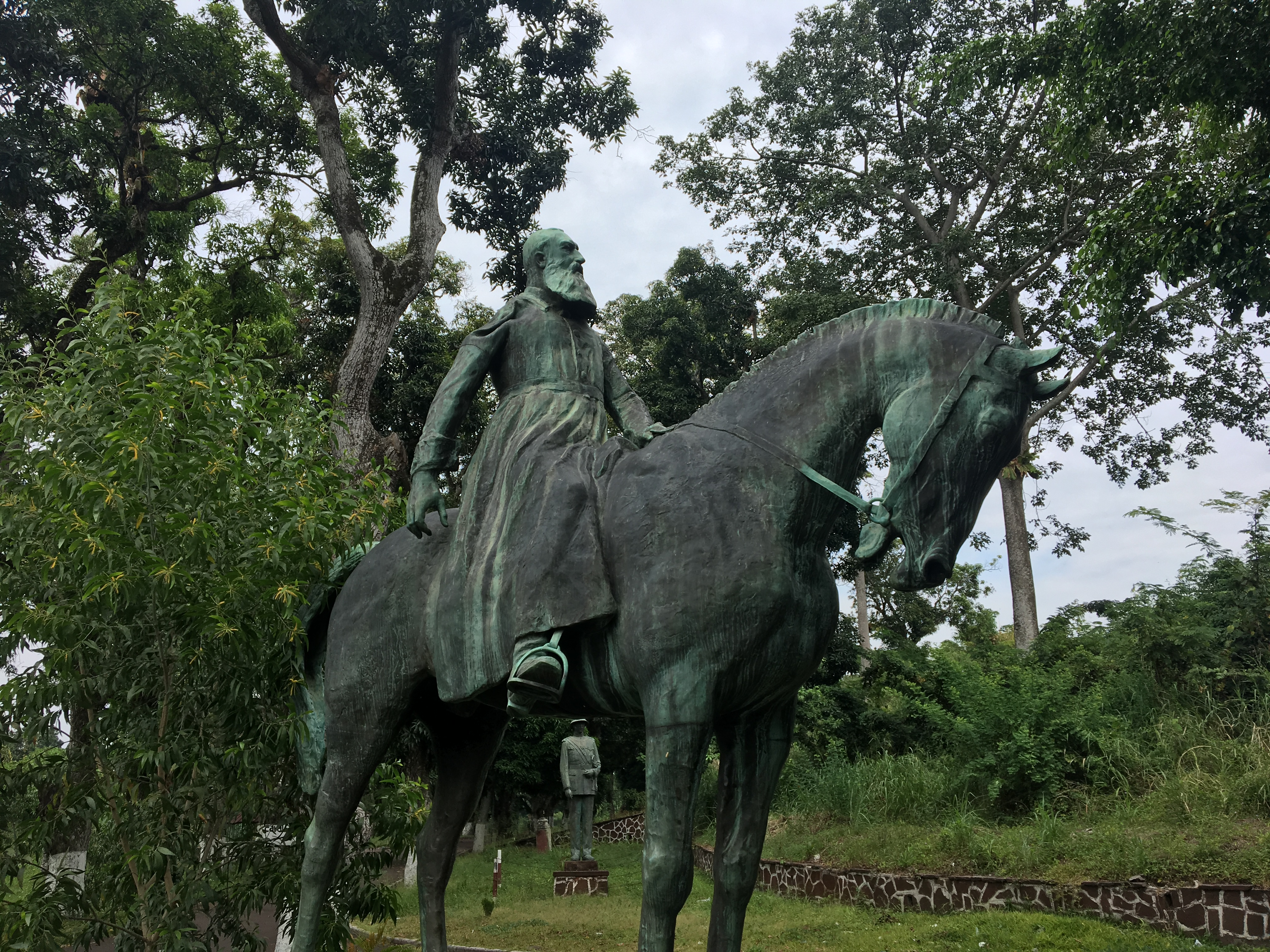 Statue de Léopold II à Kinshasa